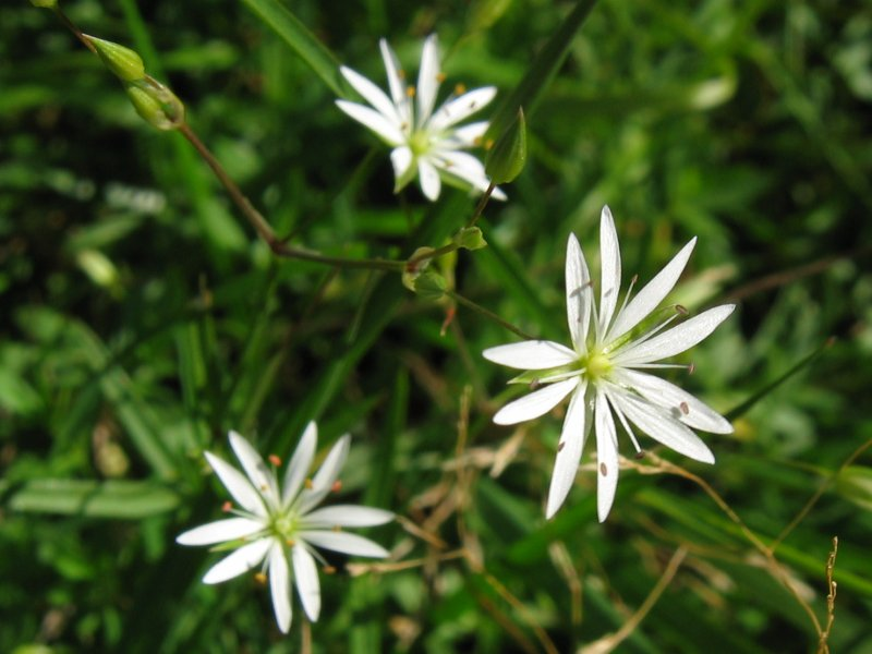 Gras-Sternmiere Stellaria graminea, Hiddensee